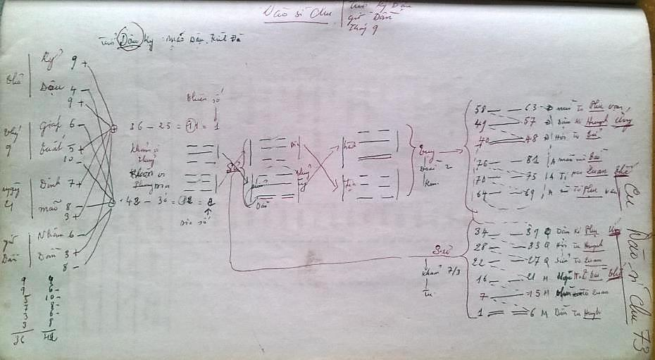 HLDSChu